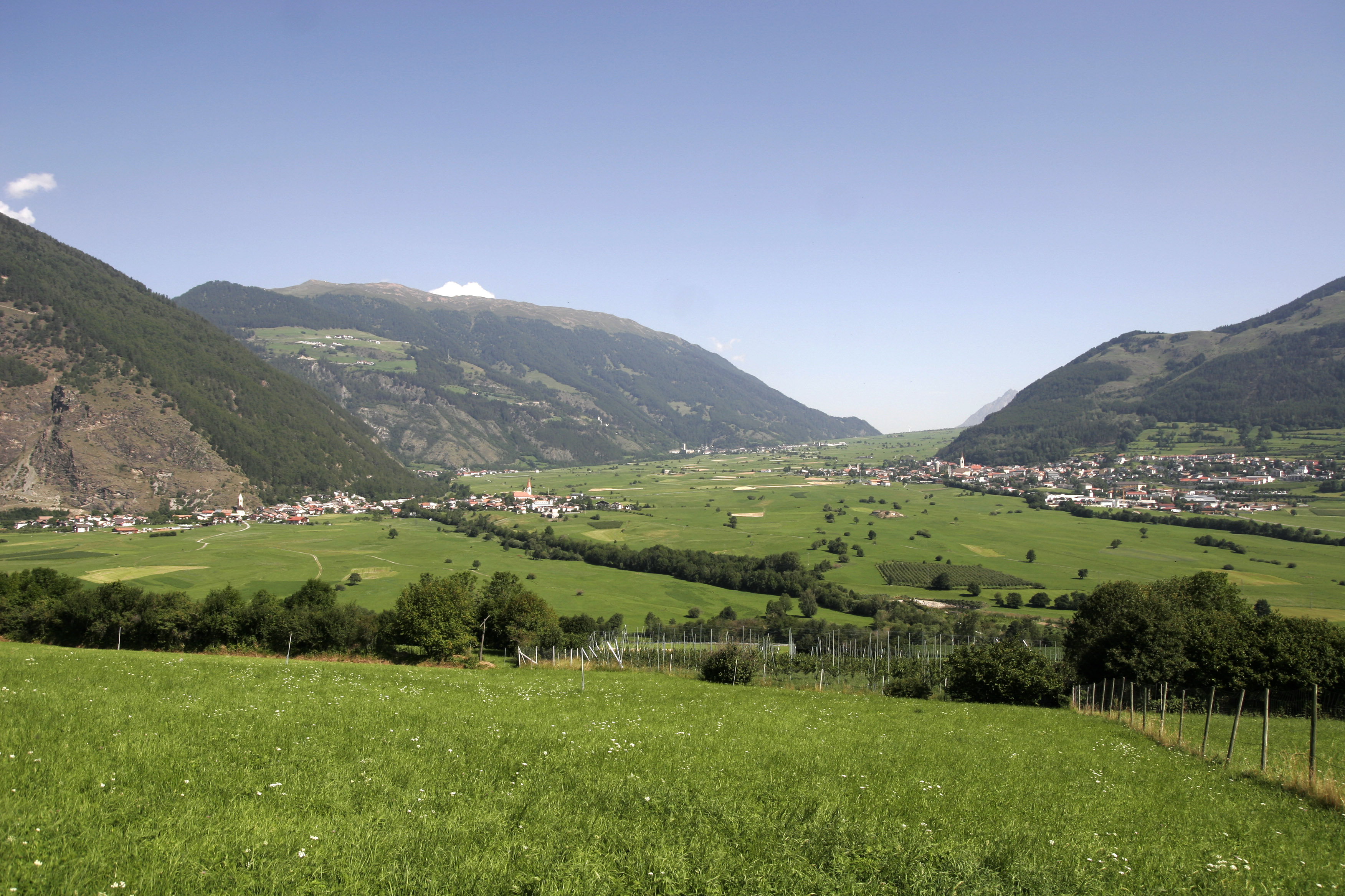 Der Obere Vinschgau. Blick von St. Jakob bei Glurns in Richtung Reschenpass (nicht sichtbar). Der Ort am rechten Bildrand ist Mals. In der Bildmitte hinten ist Burgeis mit der Fürstenburg und der Abtei Marienberg zu erkennen. Im Vordergrund eine der ersten Obstplantagen des Oberen Vinschgaus.